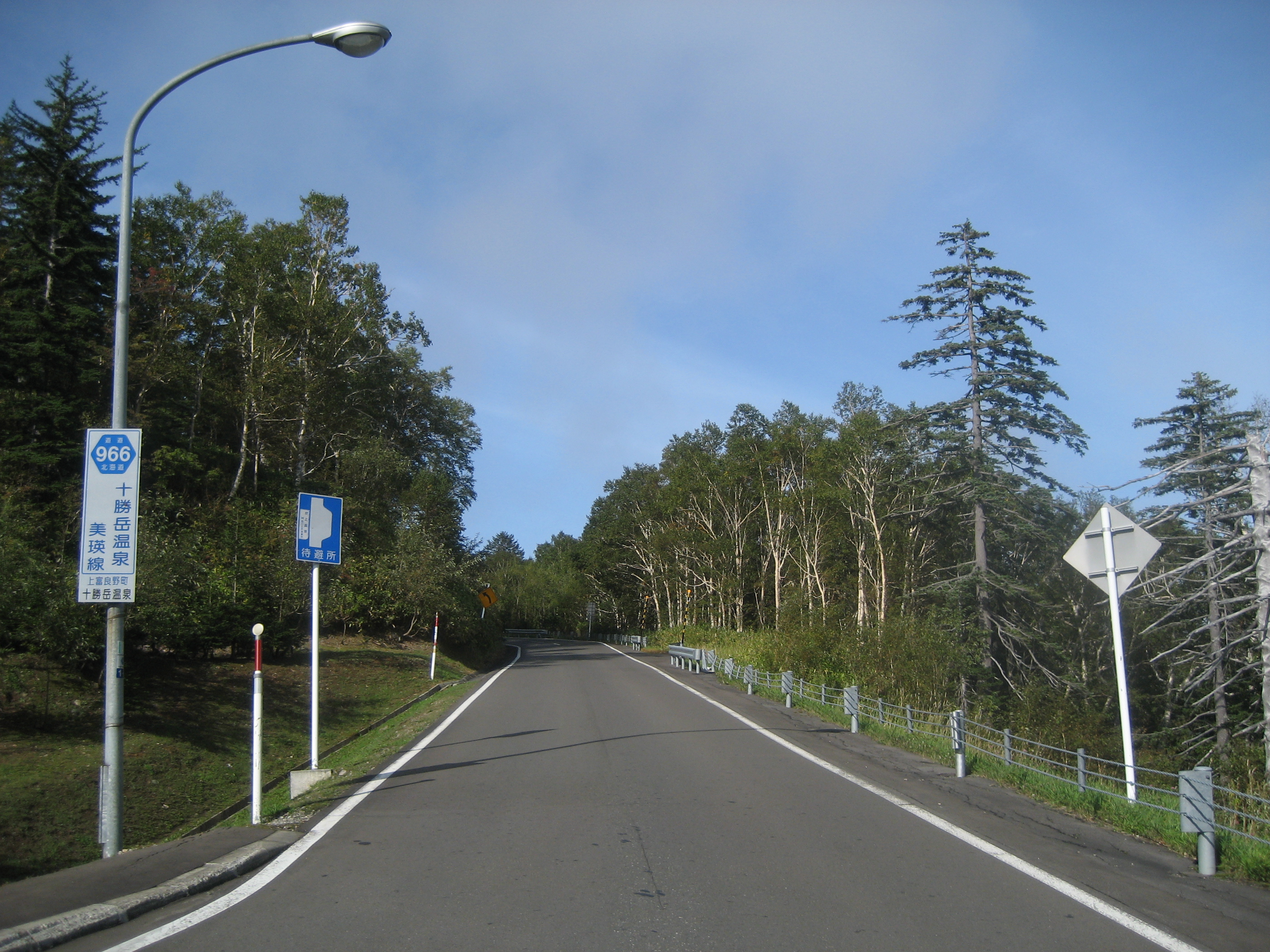 北海道道966号線上富良野町十勝岳温泉付近